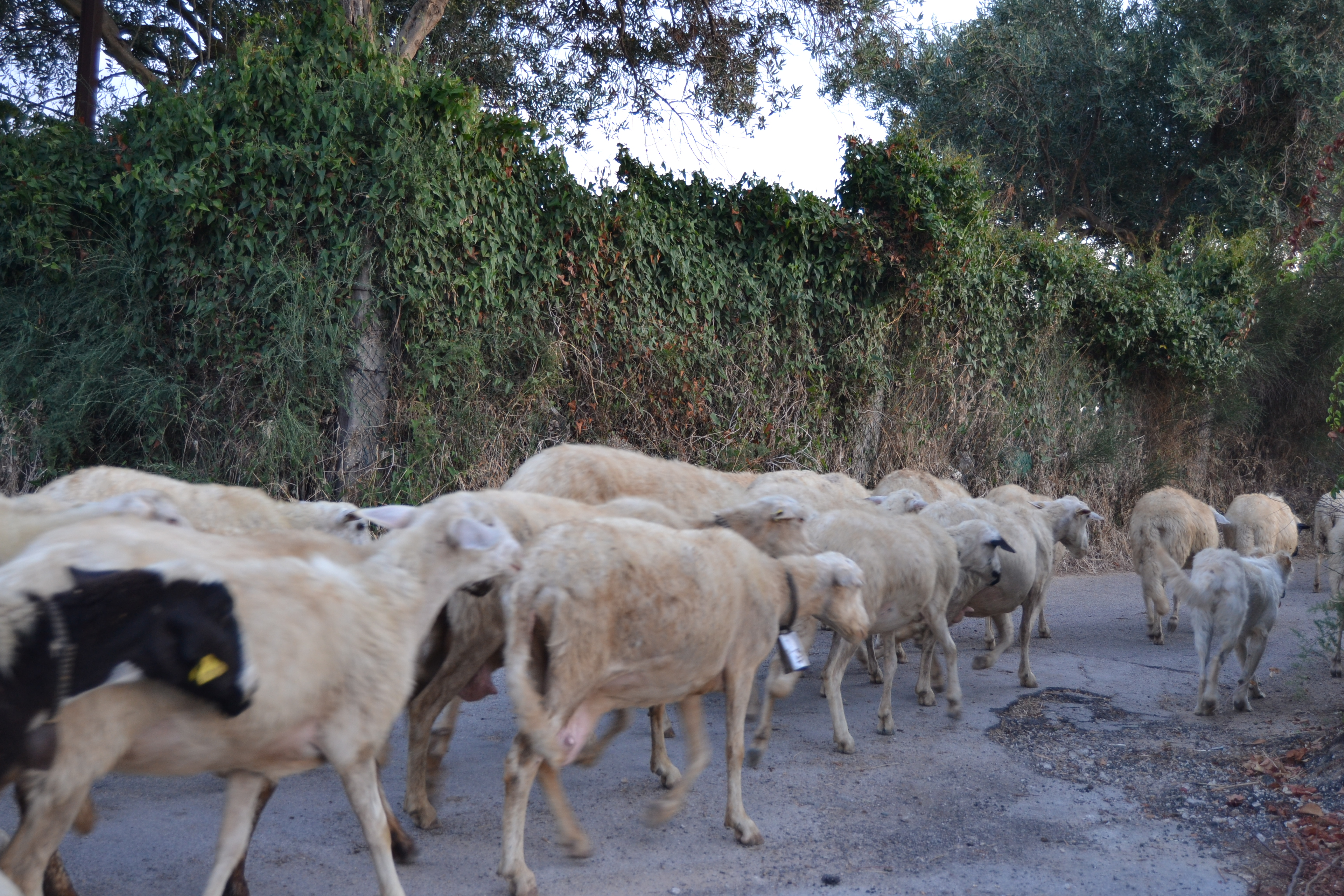 La campagna